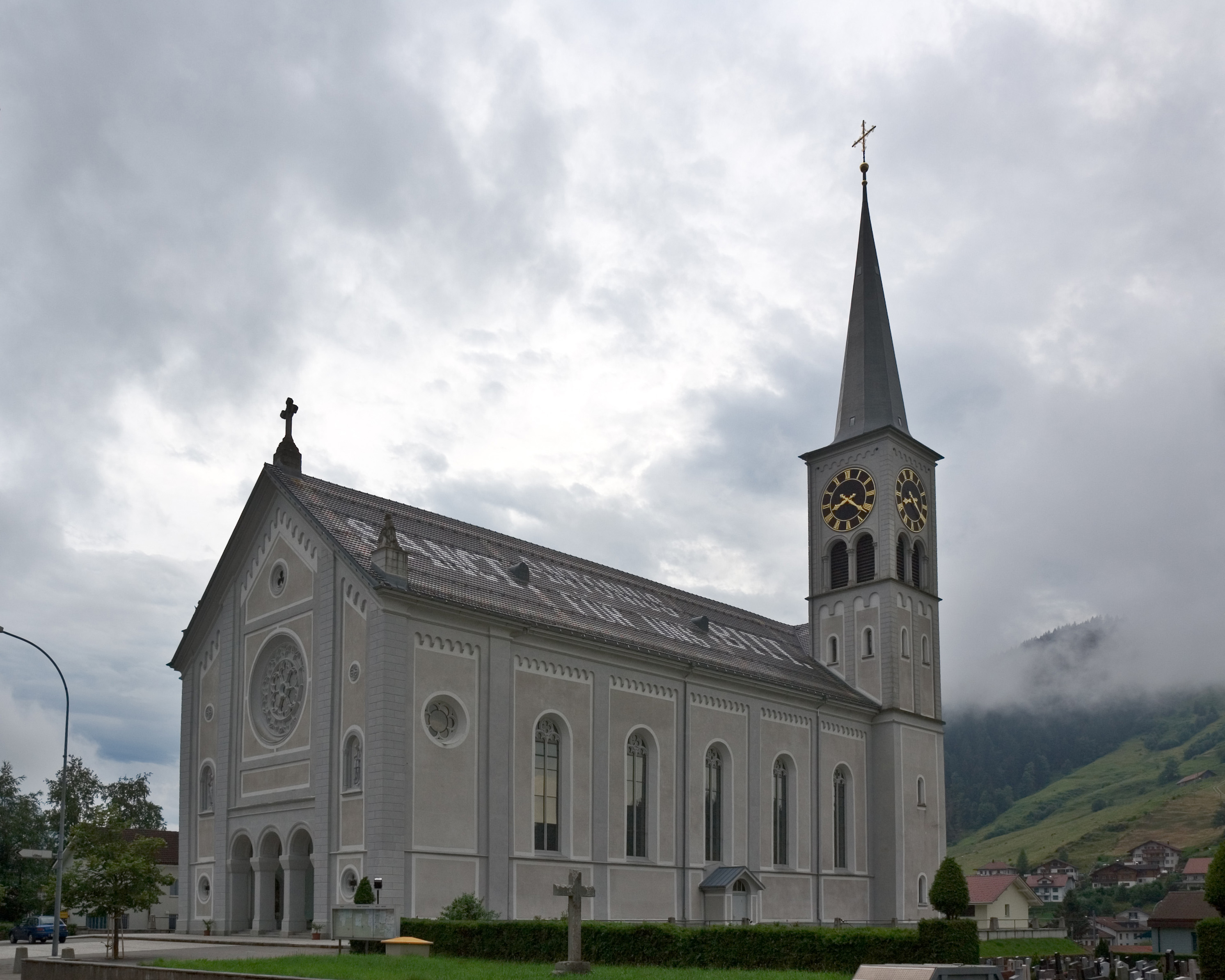 Die Pfarrkirche von Rothenthurm